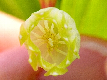 Polygonatum odoratum Angular Solomon's Seal